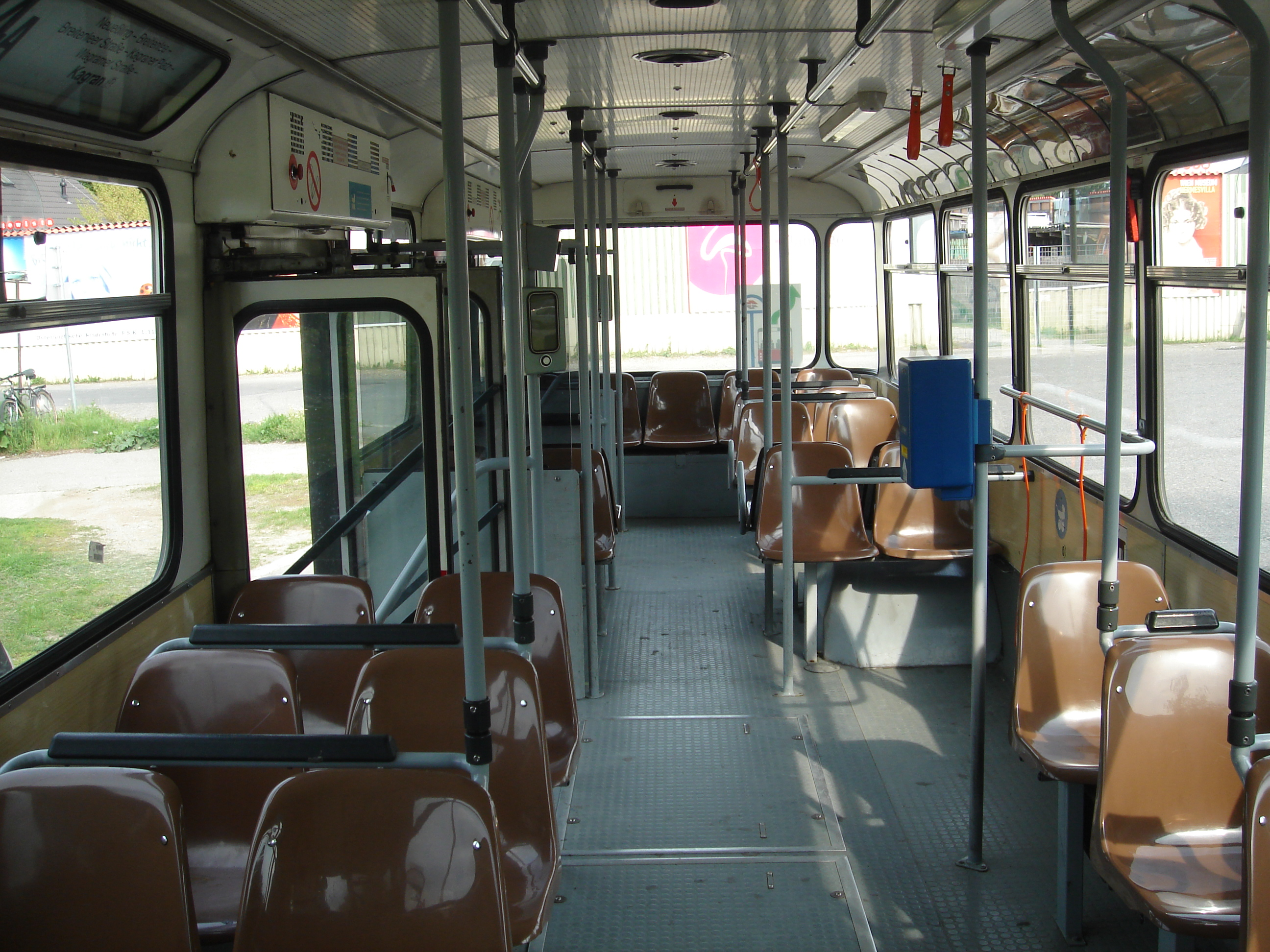 Innenansicht des LU 200 M11 8714 mit neuer PVC-Bestuhlung auf der Linie 24A in Neuessling (13. Mai 2006) Andere Versionen: keine